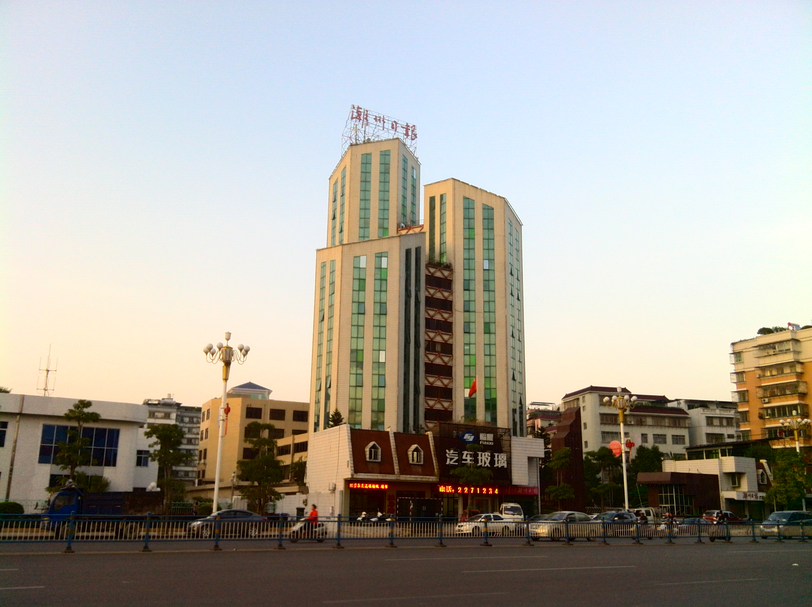 潮州日报大厦，位于枫春路。